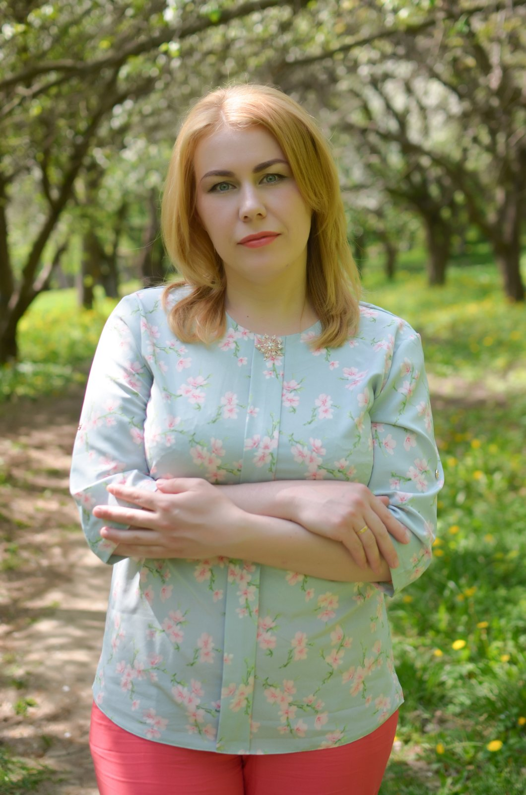 жінка